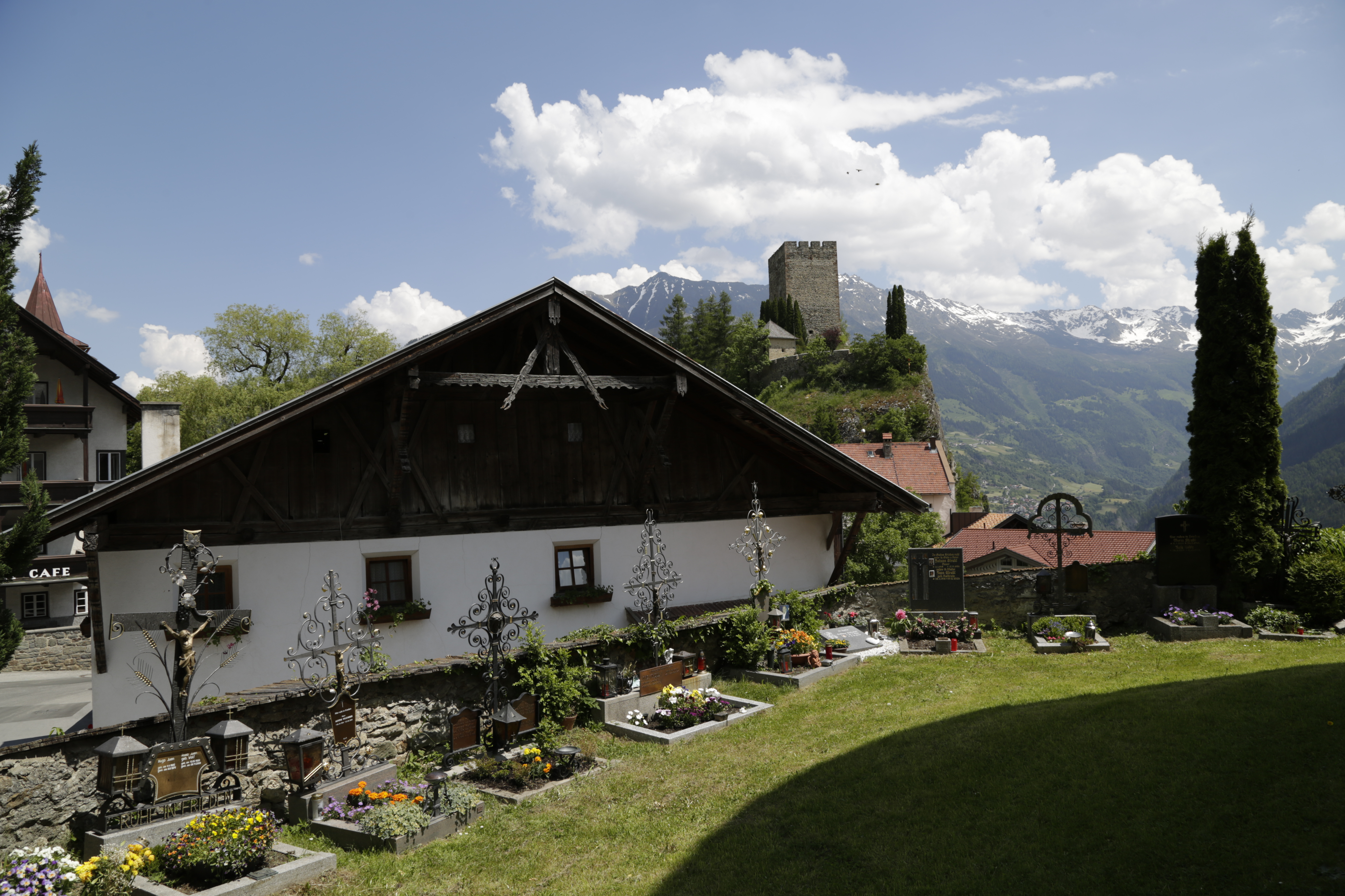 Bilder vom Friedhof von Ladis. Der Friedhof ist denkmalgeschützt.